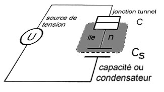 Dans la «boîte à électrons», où une île (en gris) est délimitée par une jonction tunnel et une capacité, une source de tension U couplée à l'île à travers la capacité permet d'y contrôler le nombre d'électrons. Le circuit de base constituant la "boîte à électrons" est donc formé d'une jonction tunnel de capacité C, d'un condensateur de capacité Cs et d'une source de tension (U). L'île métallique (en grisé sur la figure) possède une charge électrique (n électrons en excès) qui est contrôlée par la tension U. adapté d'après OTRS ticket 2011051210004131 confirmes that User:Jbw (the original uploader) is Jean-Baptiste Waldner.